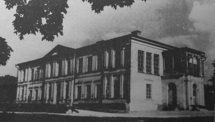 Беларуская (тарашкевіца): Лучай (Łučaj), палац Агінскіх (Aginski)